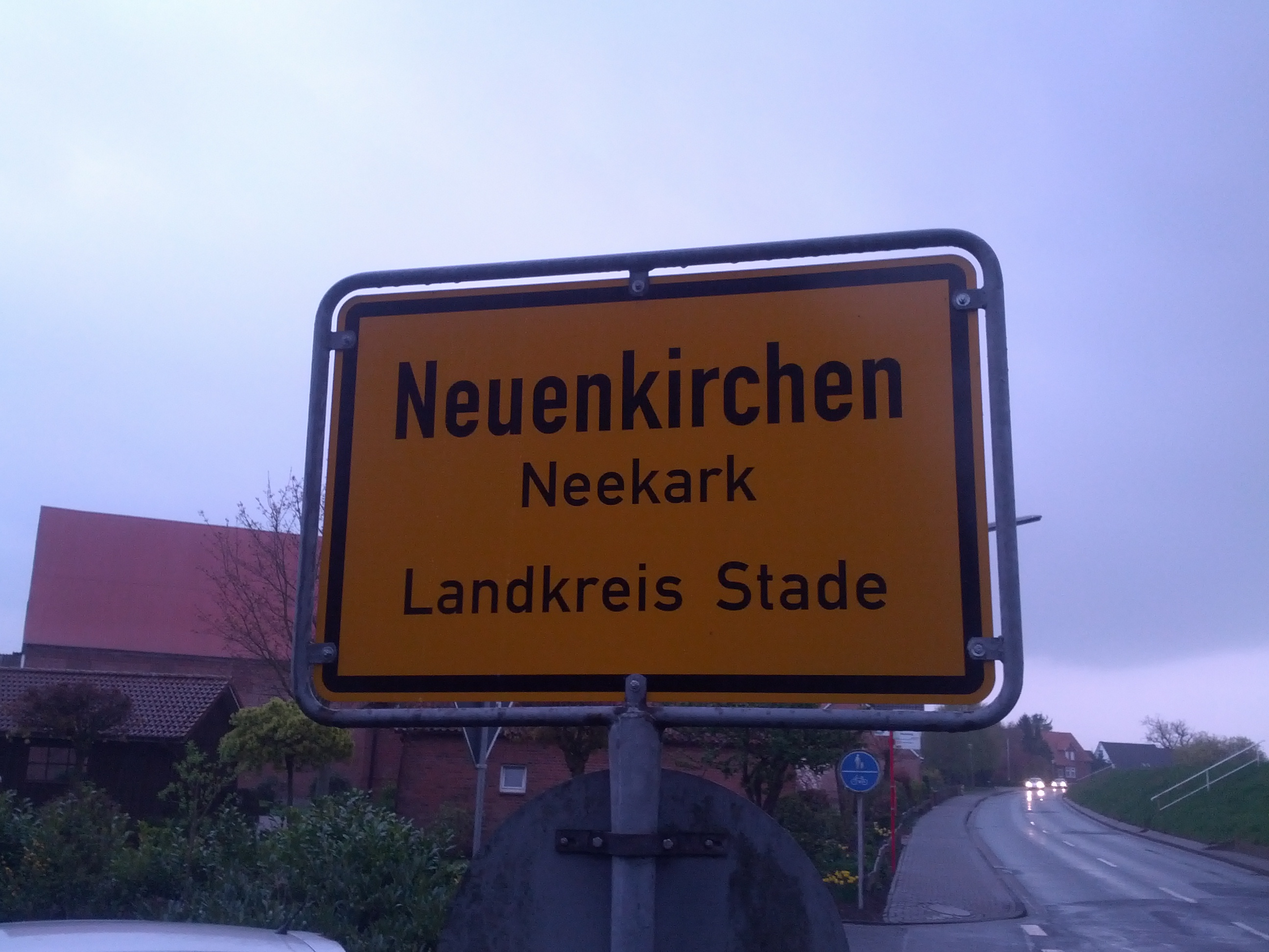 Ortsschild von Neekark, Landkreis Stood, mit den Naam op Hoochdüütsch un op Plattdüütsch